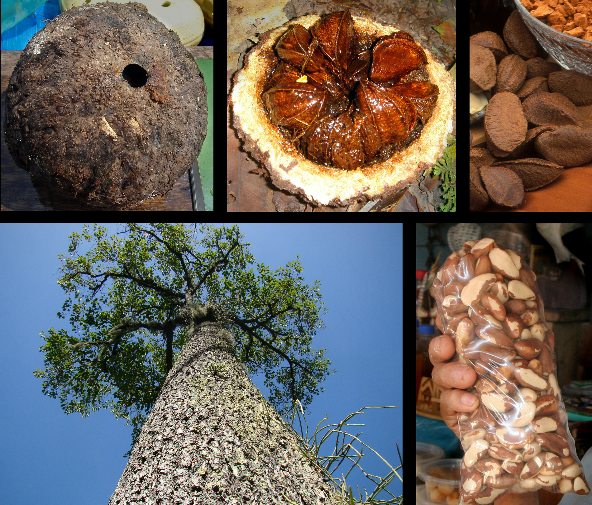 Bertholletia excelsa, Brazil nut tree. "Castaña de Pará" (Argentina).